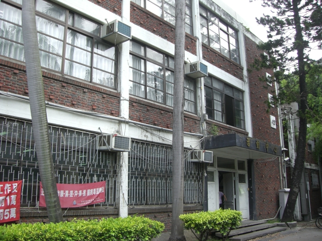 高雄中學活動中心